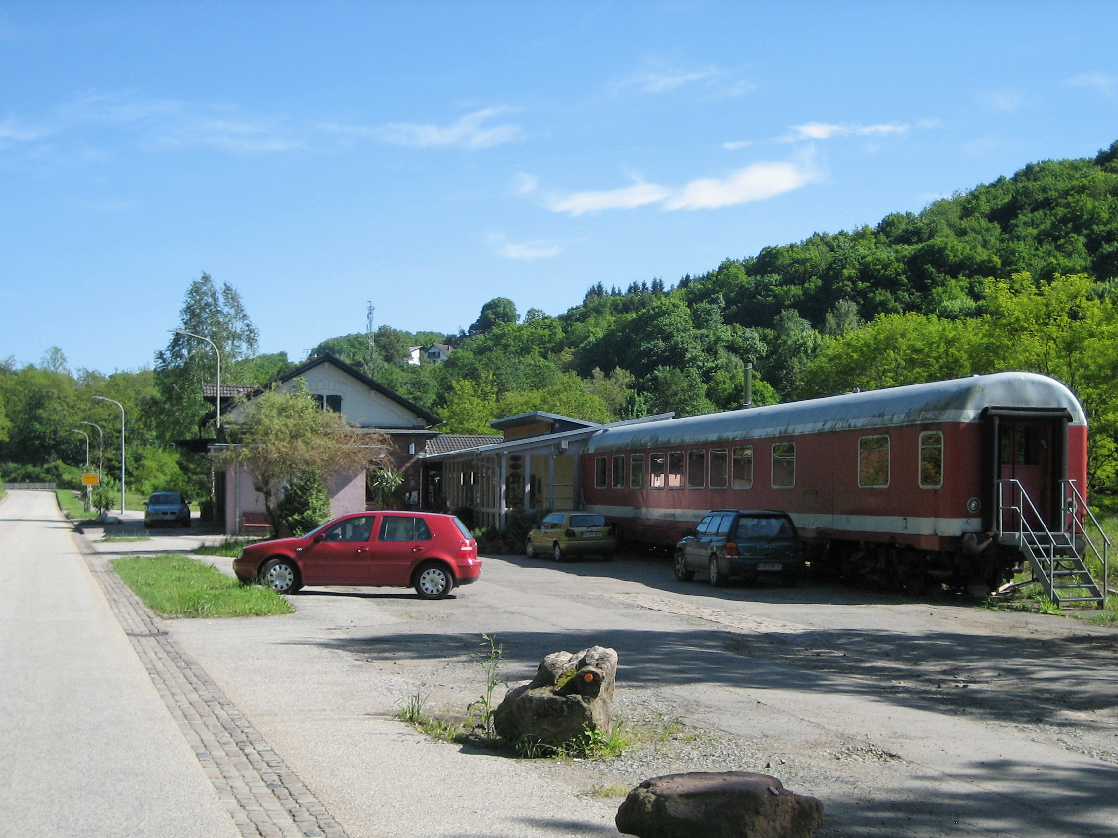 Alter Bahnhof Kreimbach